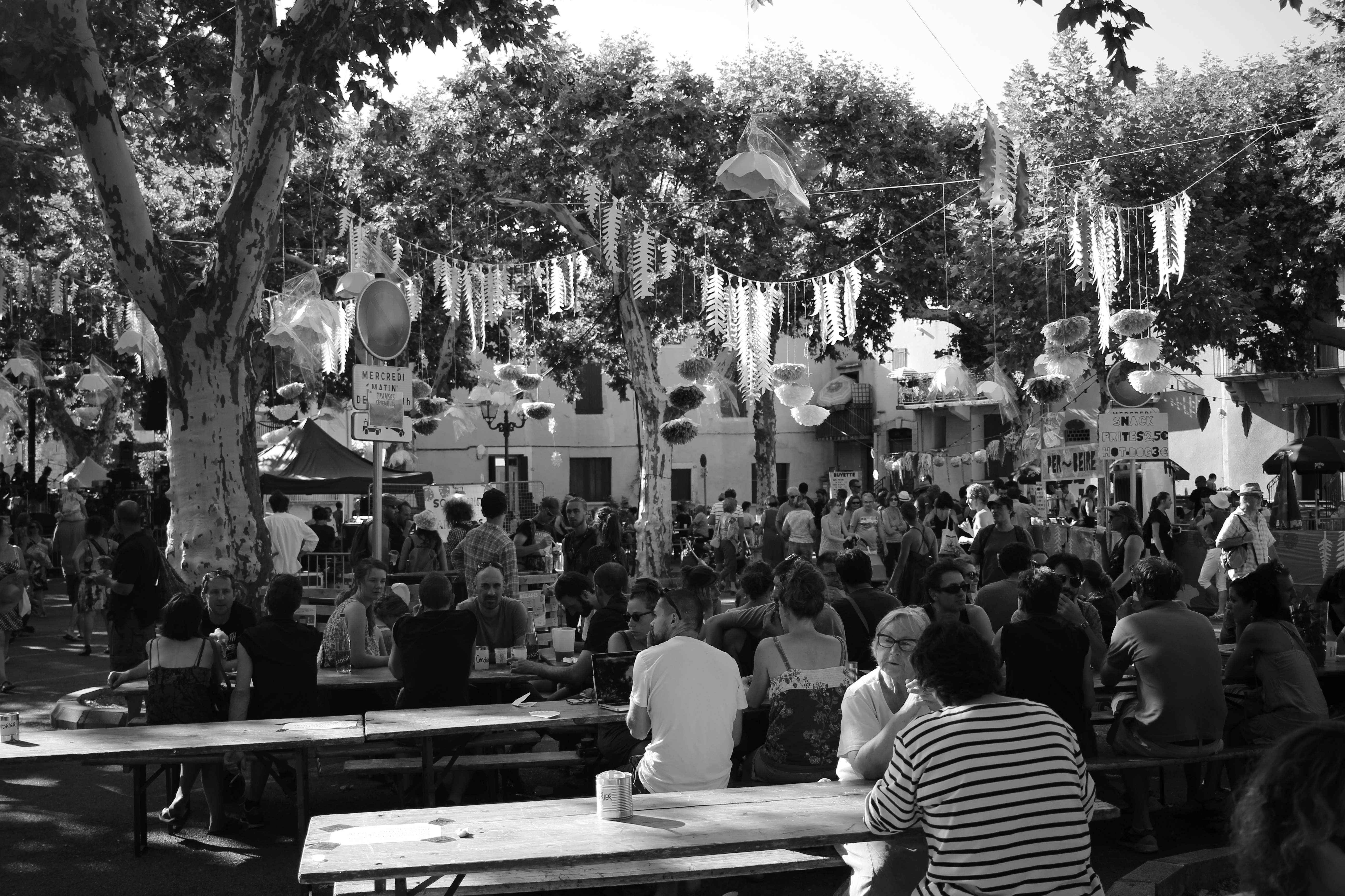 23 juil. 2017 au Festival Transes Cévénoles à Sumène, France.